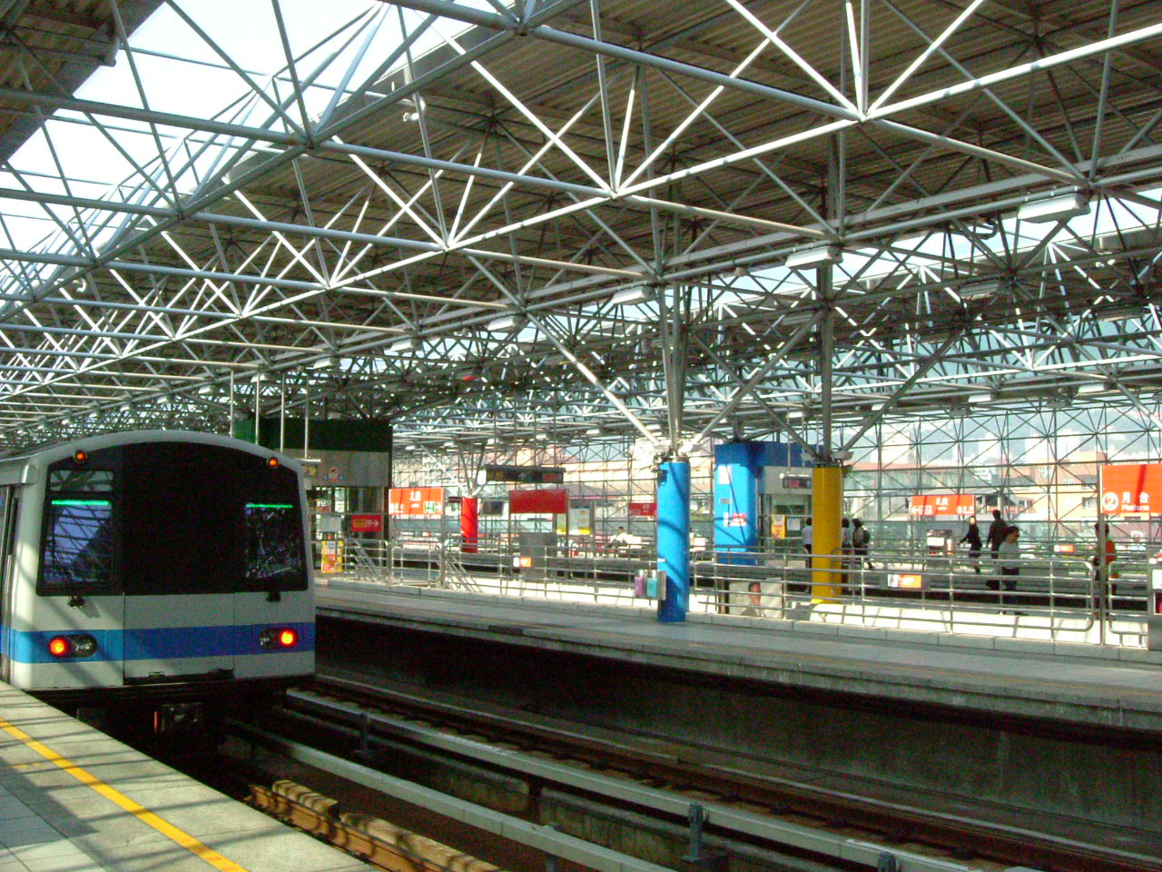 臺北捷運北投車站站內景象。